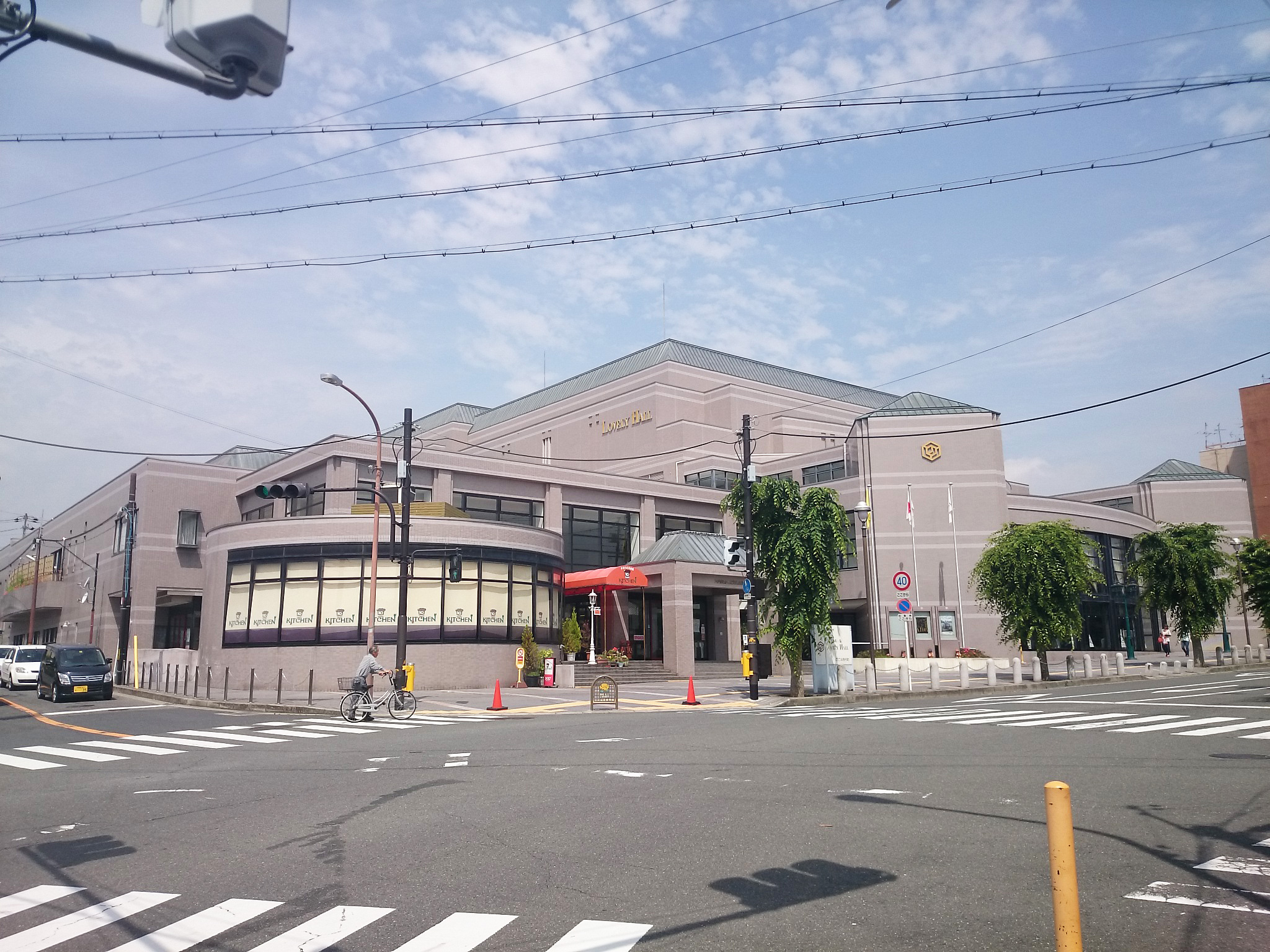 河内長野市立文化会館外観、ラブリーホール（LovelyHall）